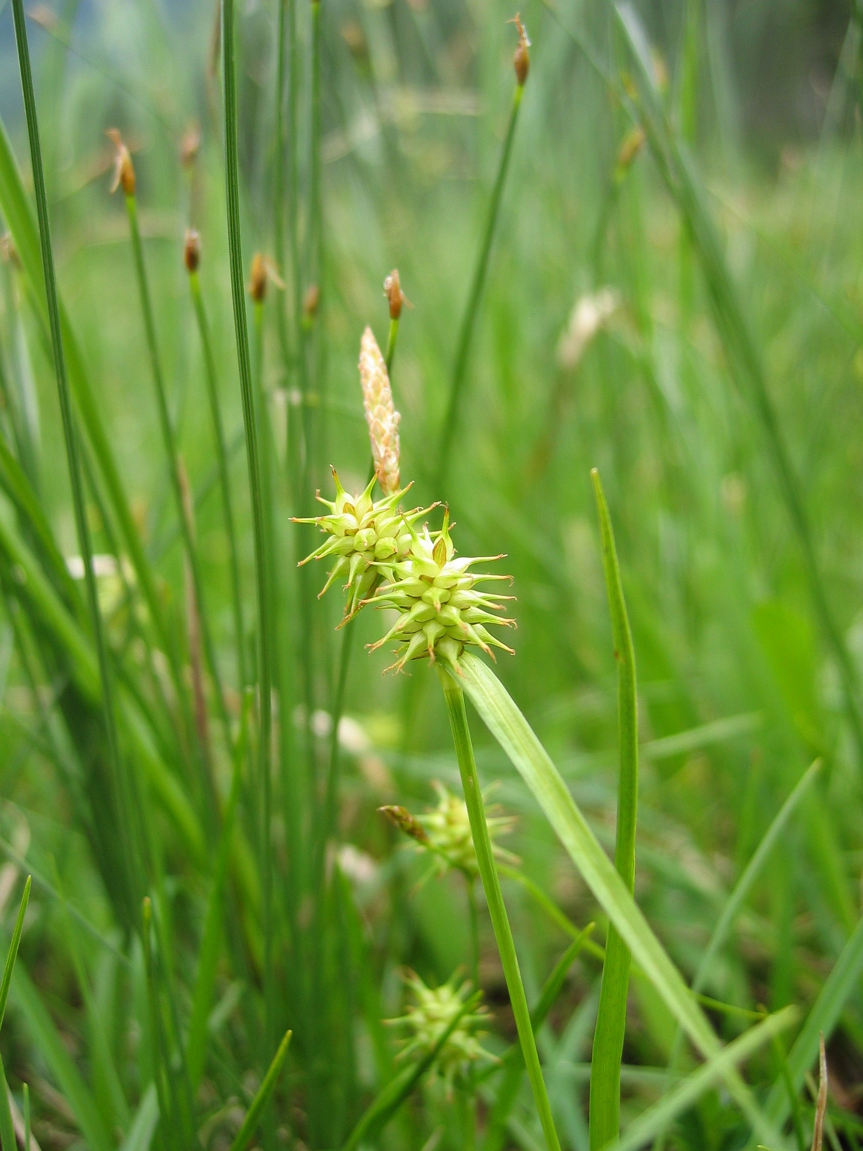 Carex flava (var. alpina ?), Wurzeralm ~1.400 m, Upper Austria, Austria